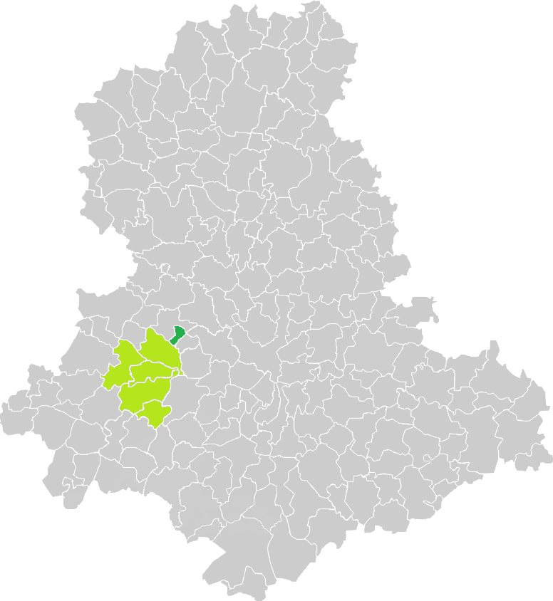 Carte de situation de la commune de Sainte-Marie-de-Vaux (en vert foncé) dans le votre Canton (en vert clair) sur une carte des communes de la Haute-Vienne